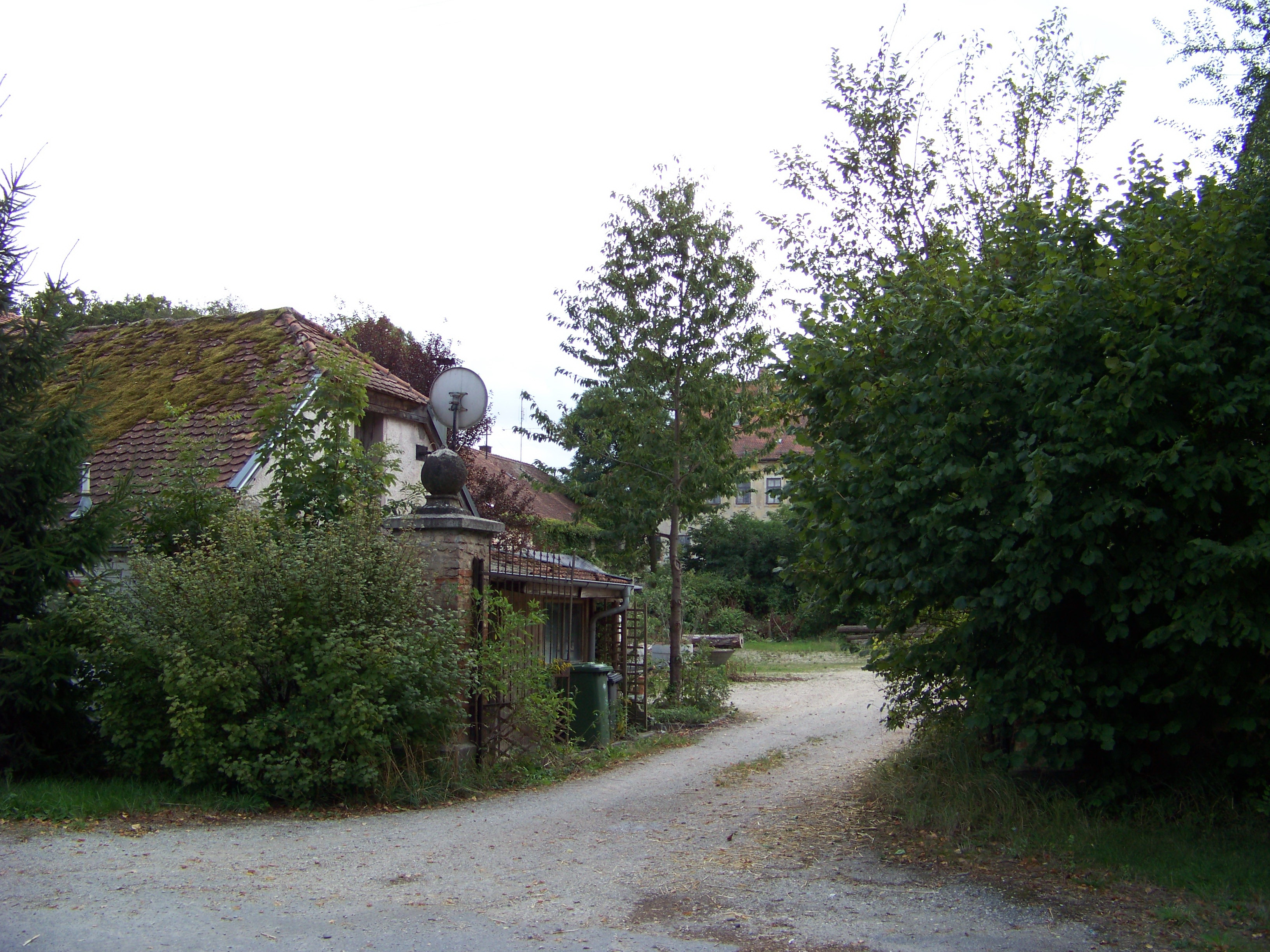 Mötzing, Schönach. Die östliche Schlosseinfahrt zum Ökonomiehof.